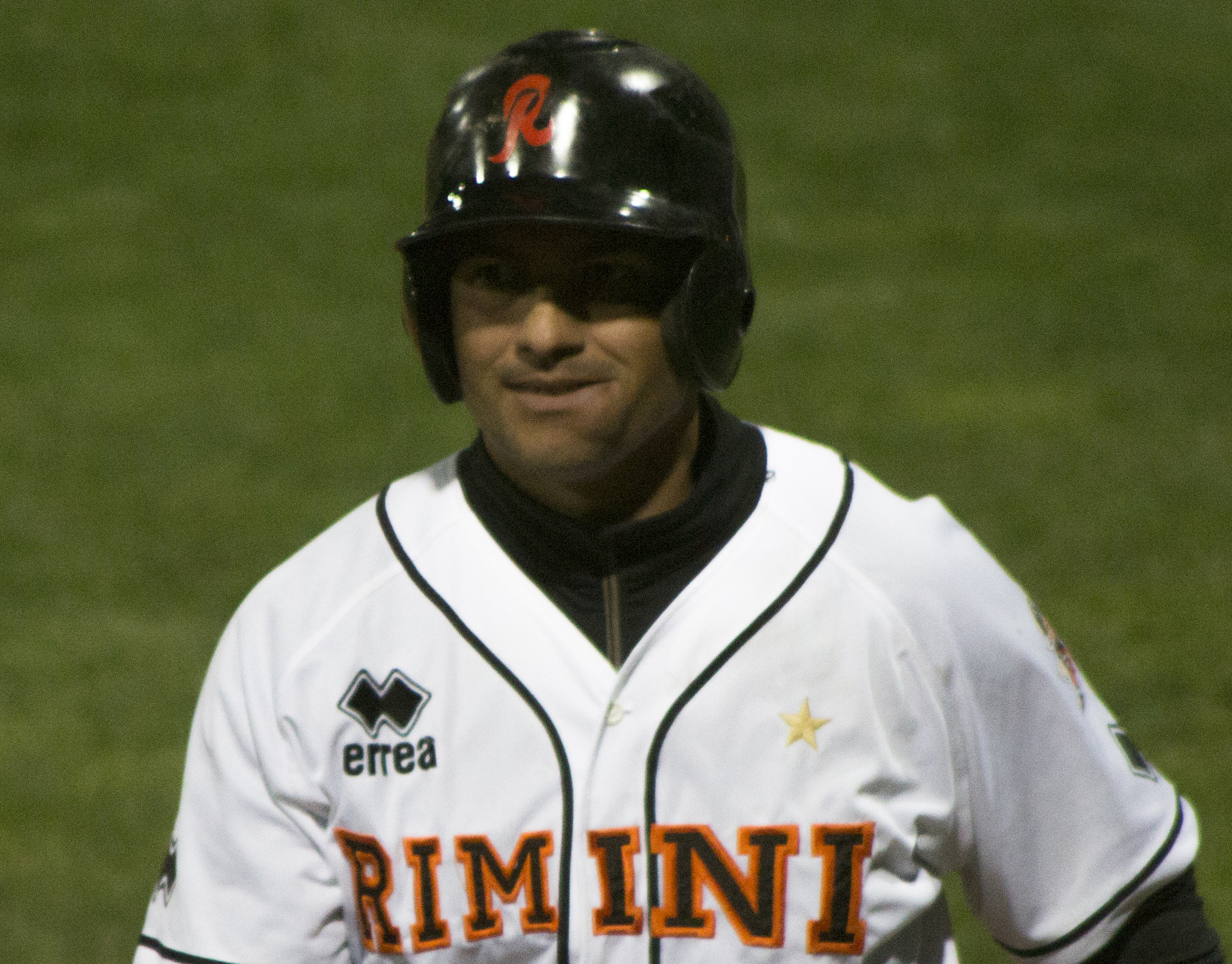 Ramón Castro durante San Marino-Rimini, gara valida per l'Italian Baseball League 2013. Foto scattata da me dagli spalti con obiettivo 70-300.